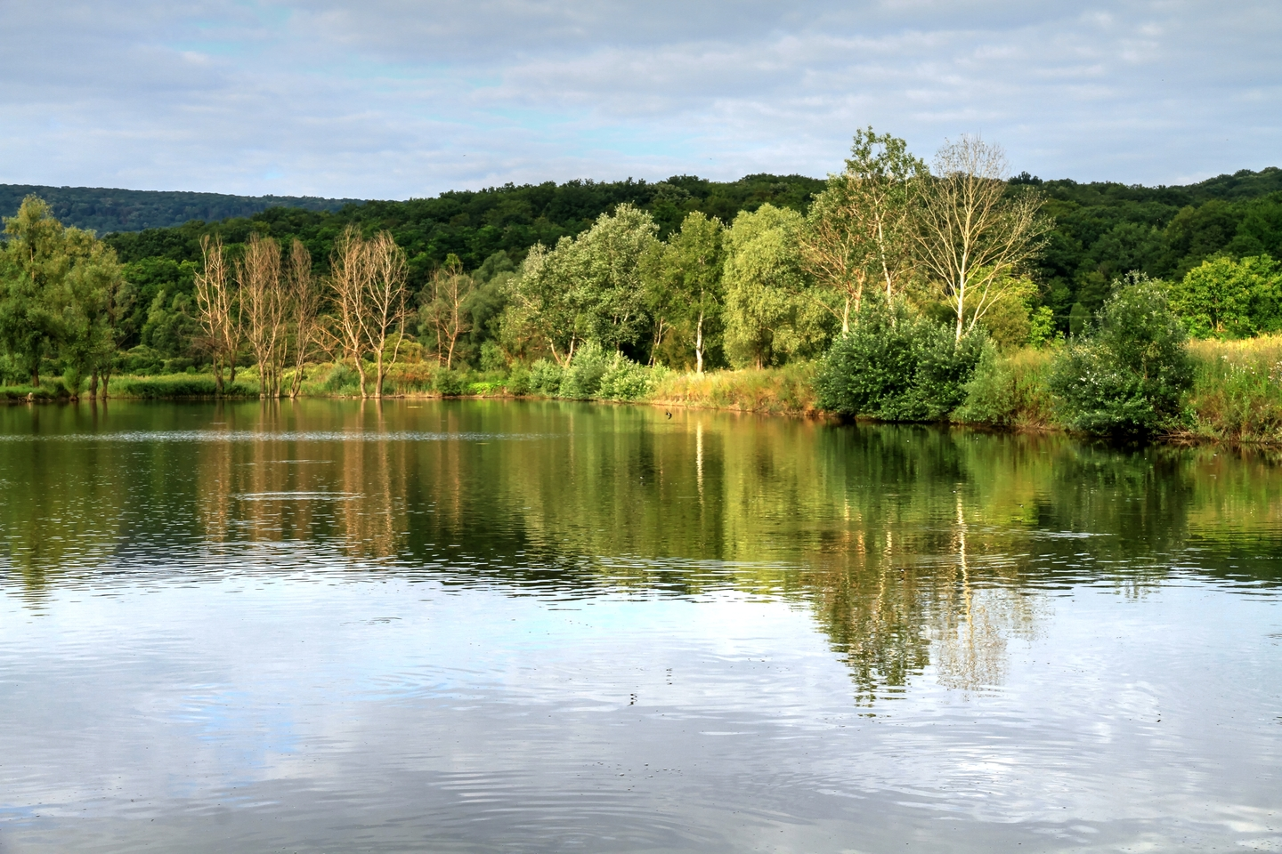 Кодру, монумент природы, находится в Стрэшенский район, с. Лозова (код MD-ST-rs-001)